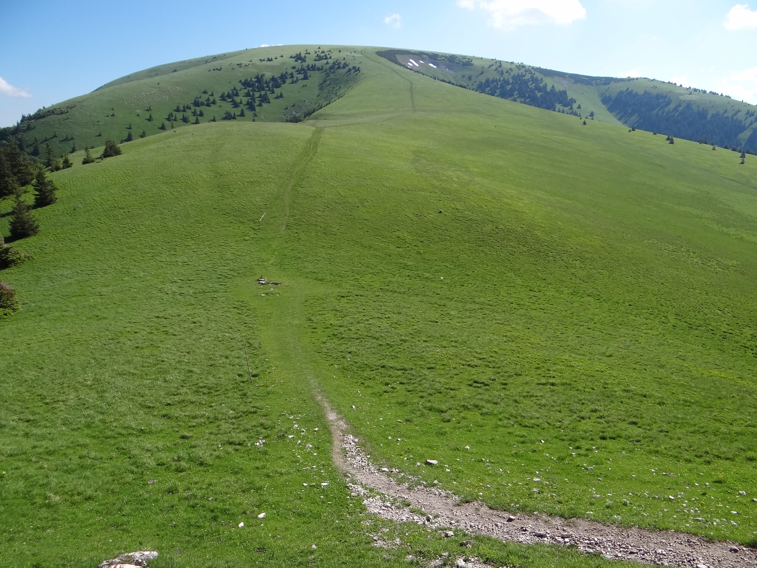 Ploská